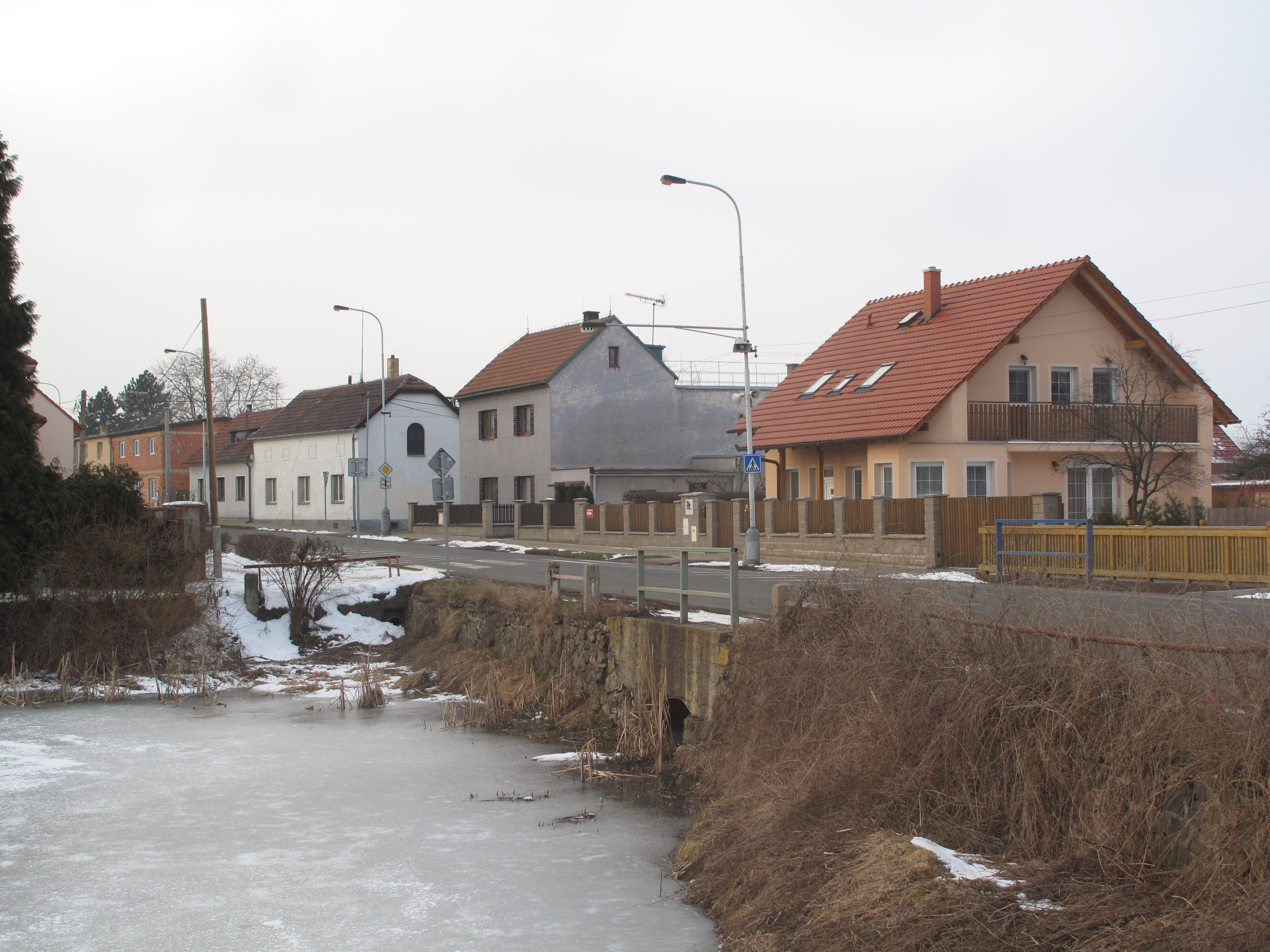 Zdiby